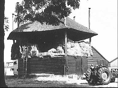 Betuwe/ Hooiberg: hooiberg zesroeden via K. Boeder 81/2 nr.11 (opmerking: Deze afbeelding hebben wij helaas alleen in deze lage resolutie.)